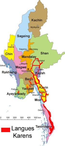 Carte du Myanmar localisant les populations Karens